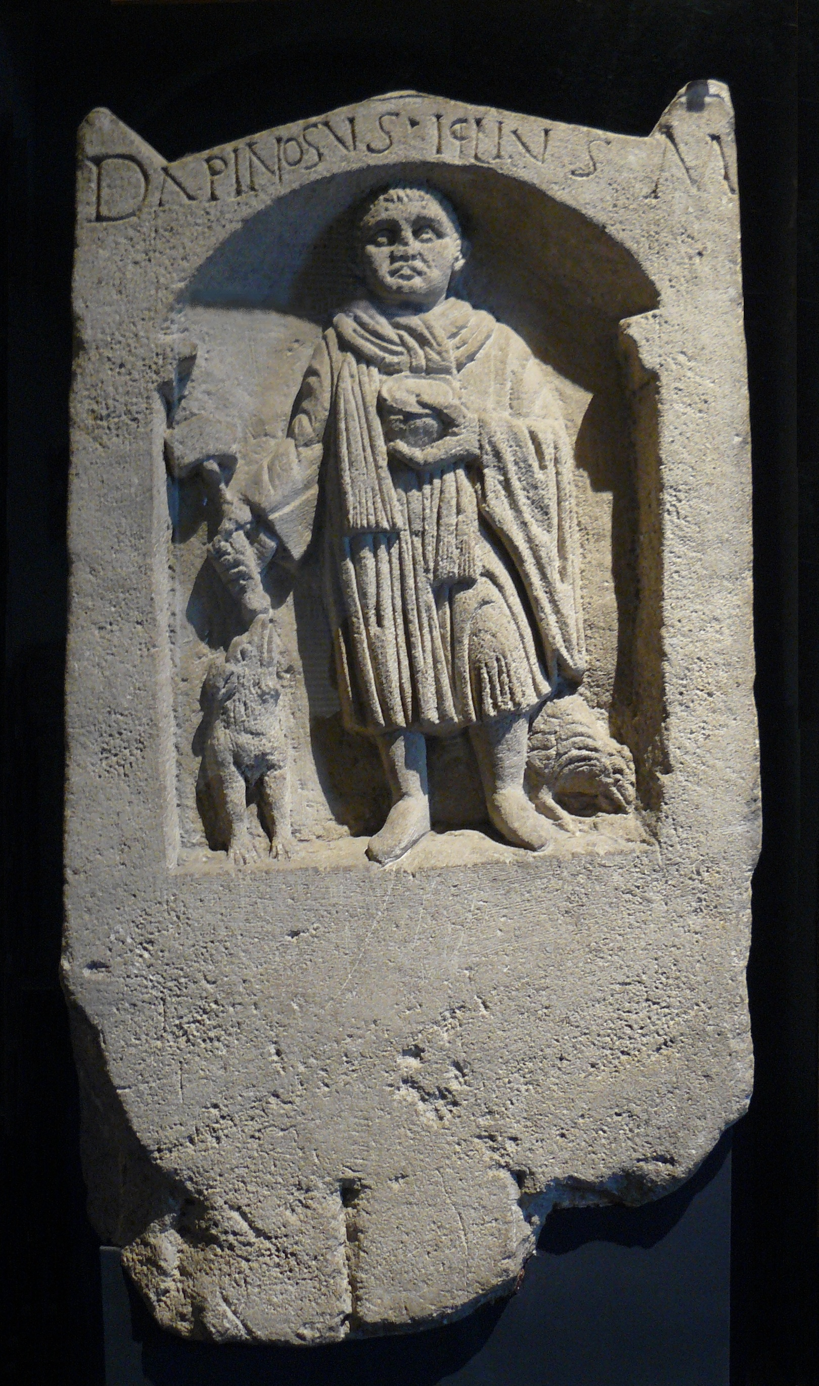 Stéle funéraire d'Apinosus Iclius - D-APINOSVS-ICLIVS-M - D(iis)-Apinsus-Iclius-M(anibus) - Aux Dieux Manes, Apinosus Iclius (qui repose ici) - calcaire Ier siècle ap. J.C. - Entrains, Nièvre, France - référence épigraphique CIL XIII 2911 - M.A.N. St-Germain-en-Laye